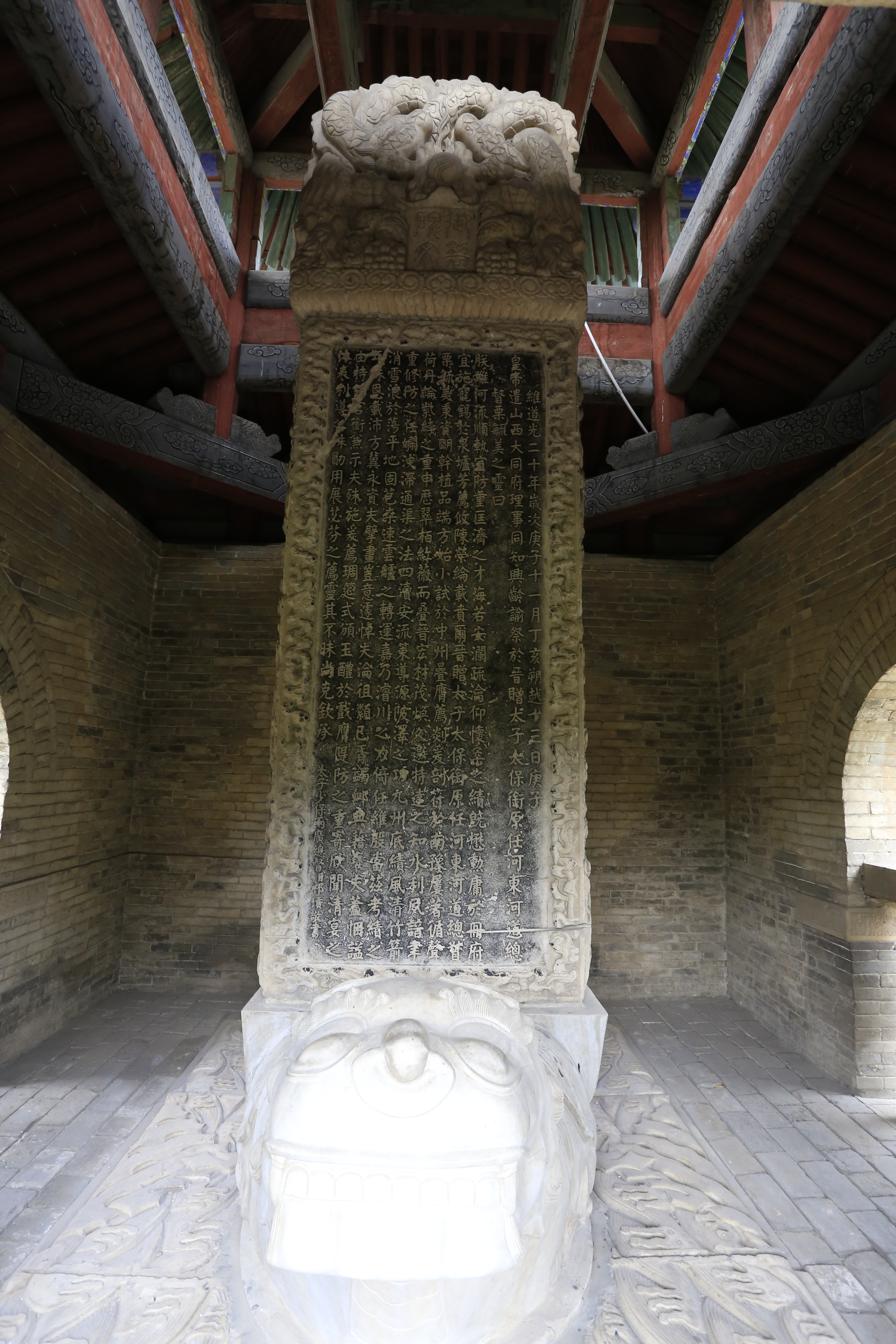 浑源栗毓美墓—— 祁𡎴書碑文